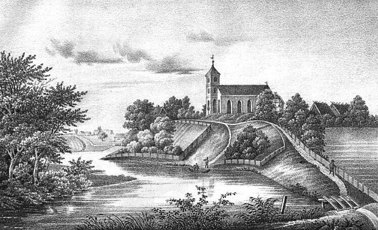 Ansicht von Rudau im Samland, Ostpreußen, um ca. 1842